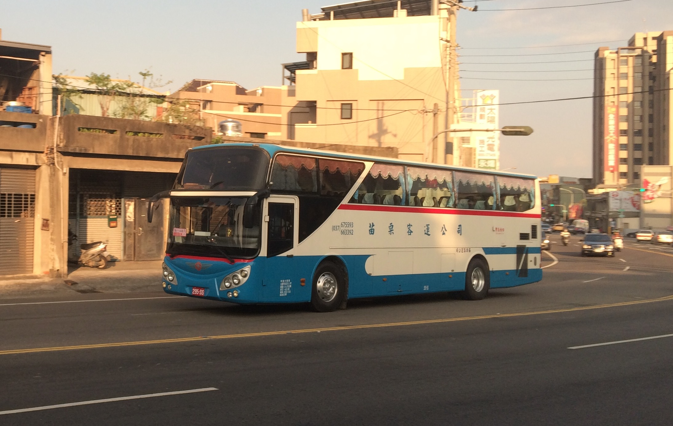 苗栗客運遊覽部日野RK8JRSA大客車295-SS，行駛於苗栗縣頭份市中正一路。